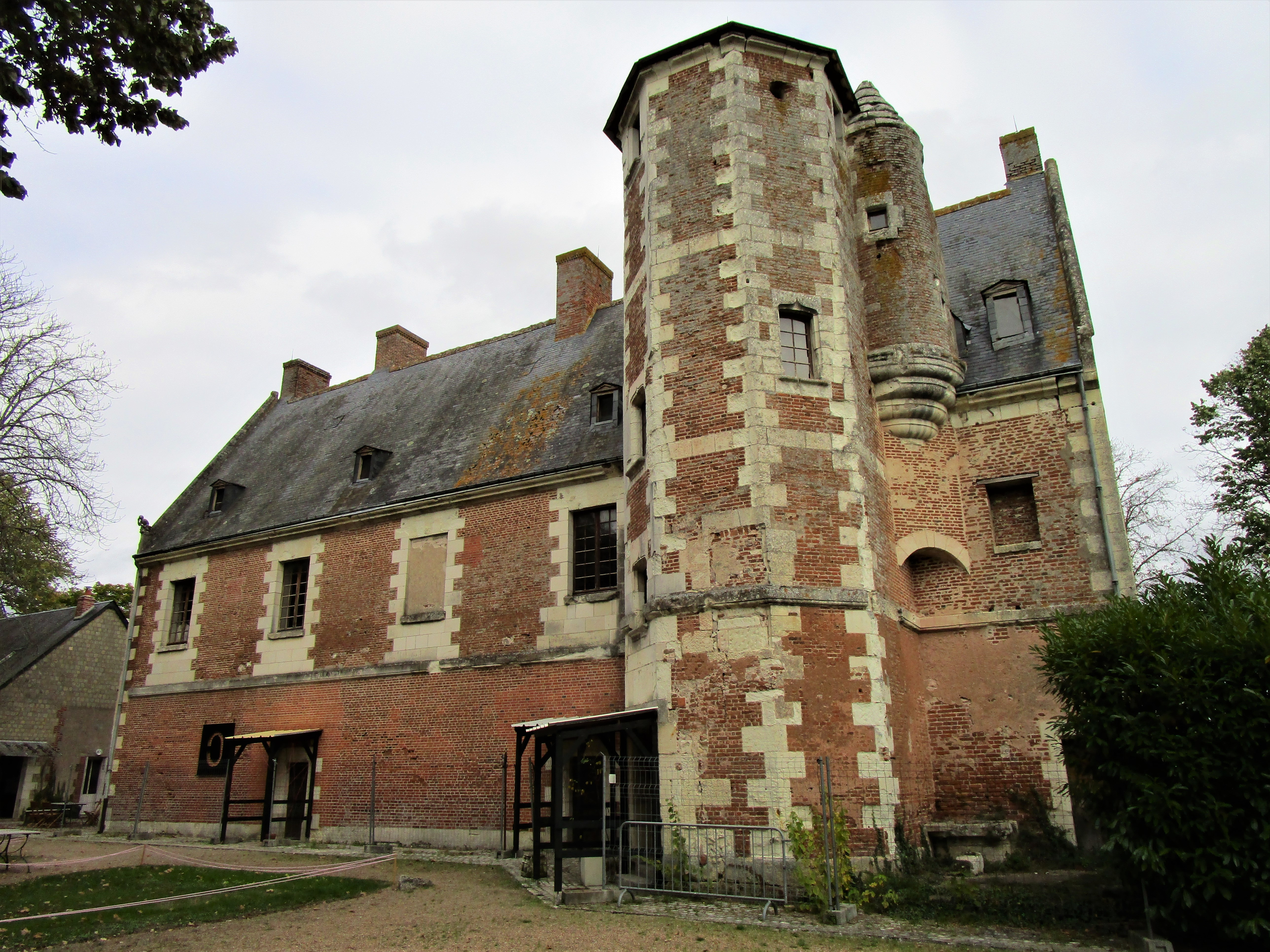 Le Château de Plessis-lès-Tours en octobre 2017.